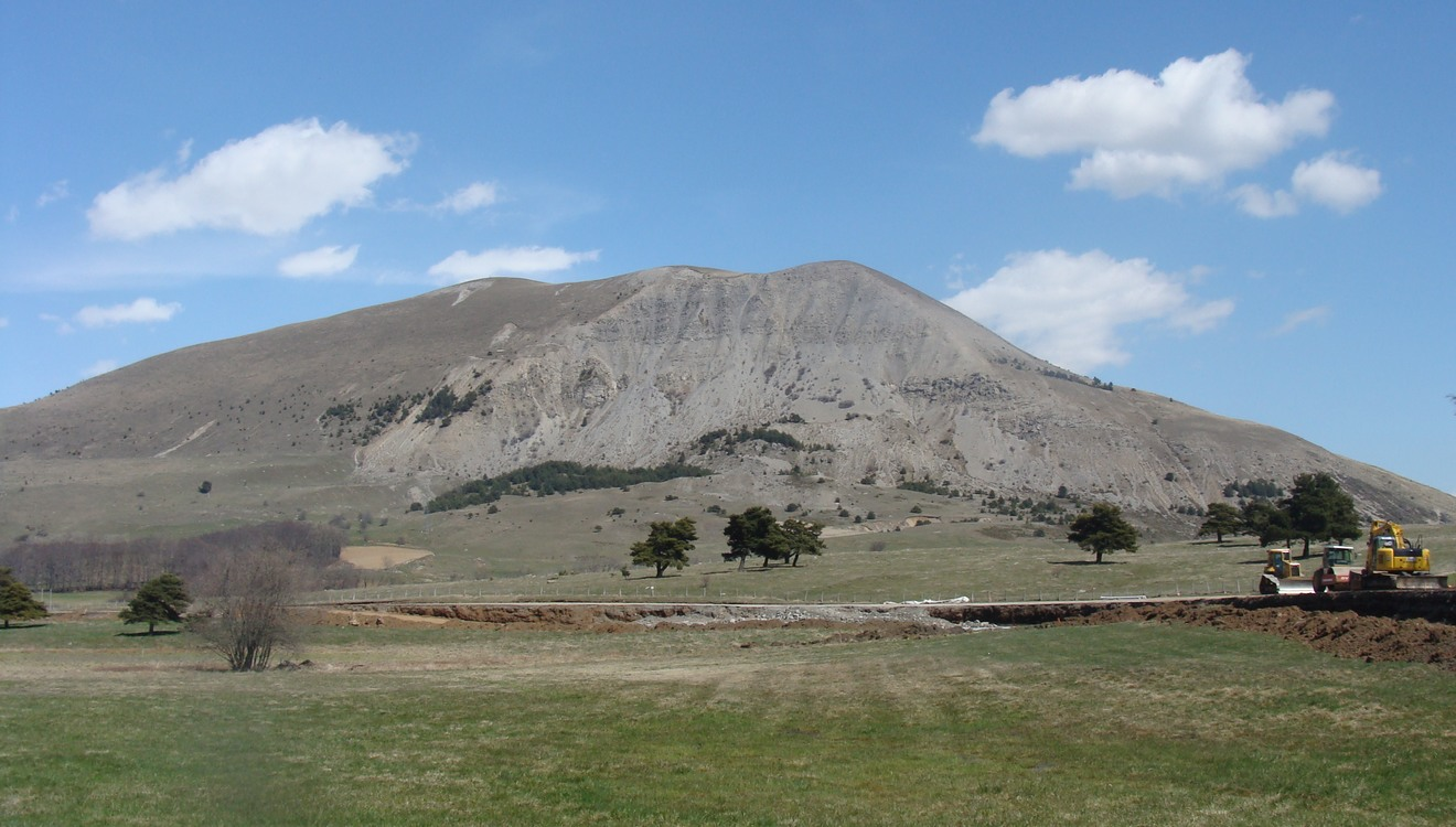 Le Puy de Manse (altitude 1617 mètres) vu du col de Manse (printemps 2008, au premier plan les travaux de déviation de la route D 944).